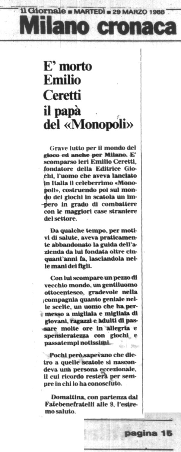 Il necrologio di Emilio Ceretti scritto da Indro Montanelli su Il Giornale l'indomani della sua scomparsa